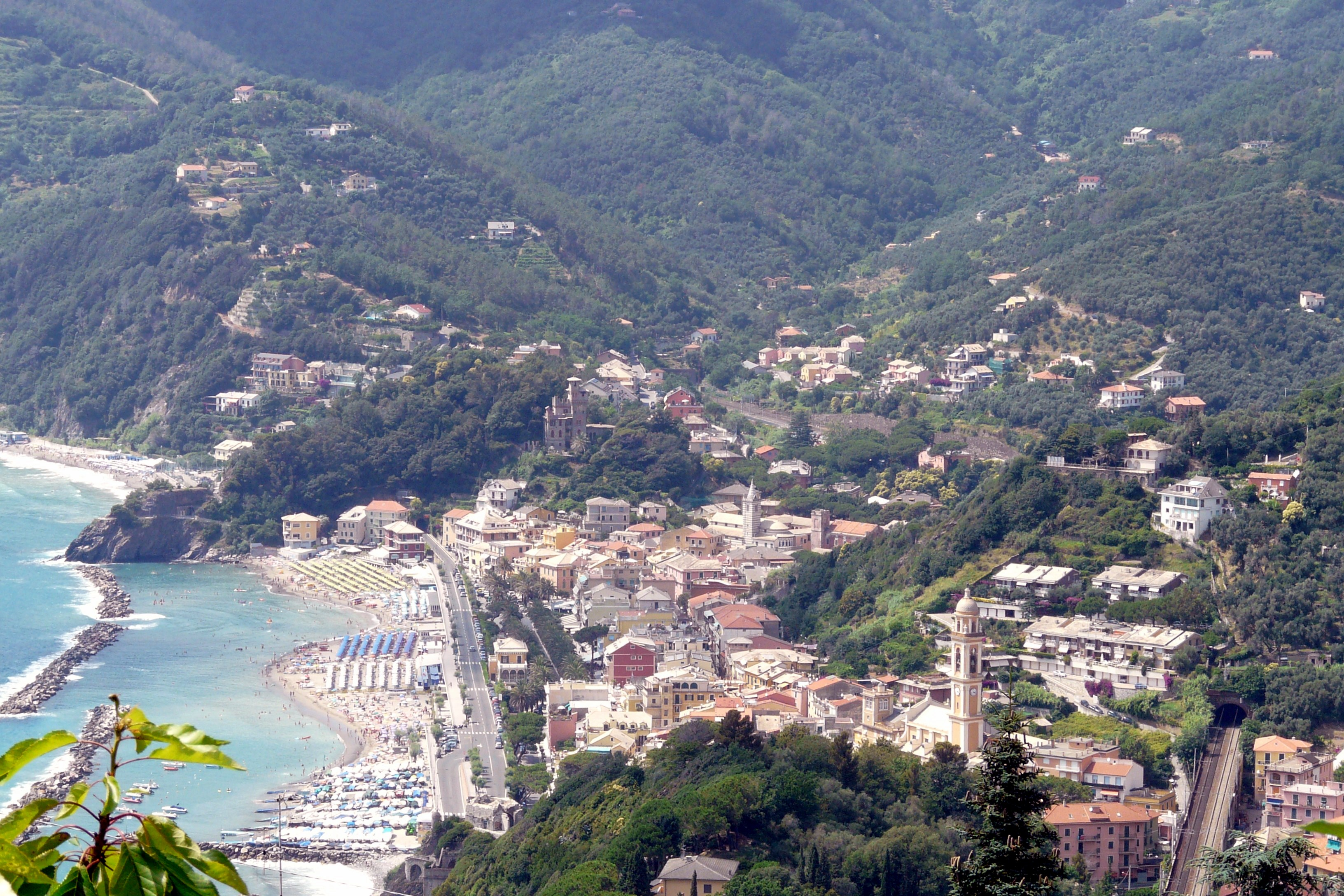 Panorama da Lemeglio di Moneglia, Liguria, Italia